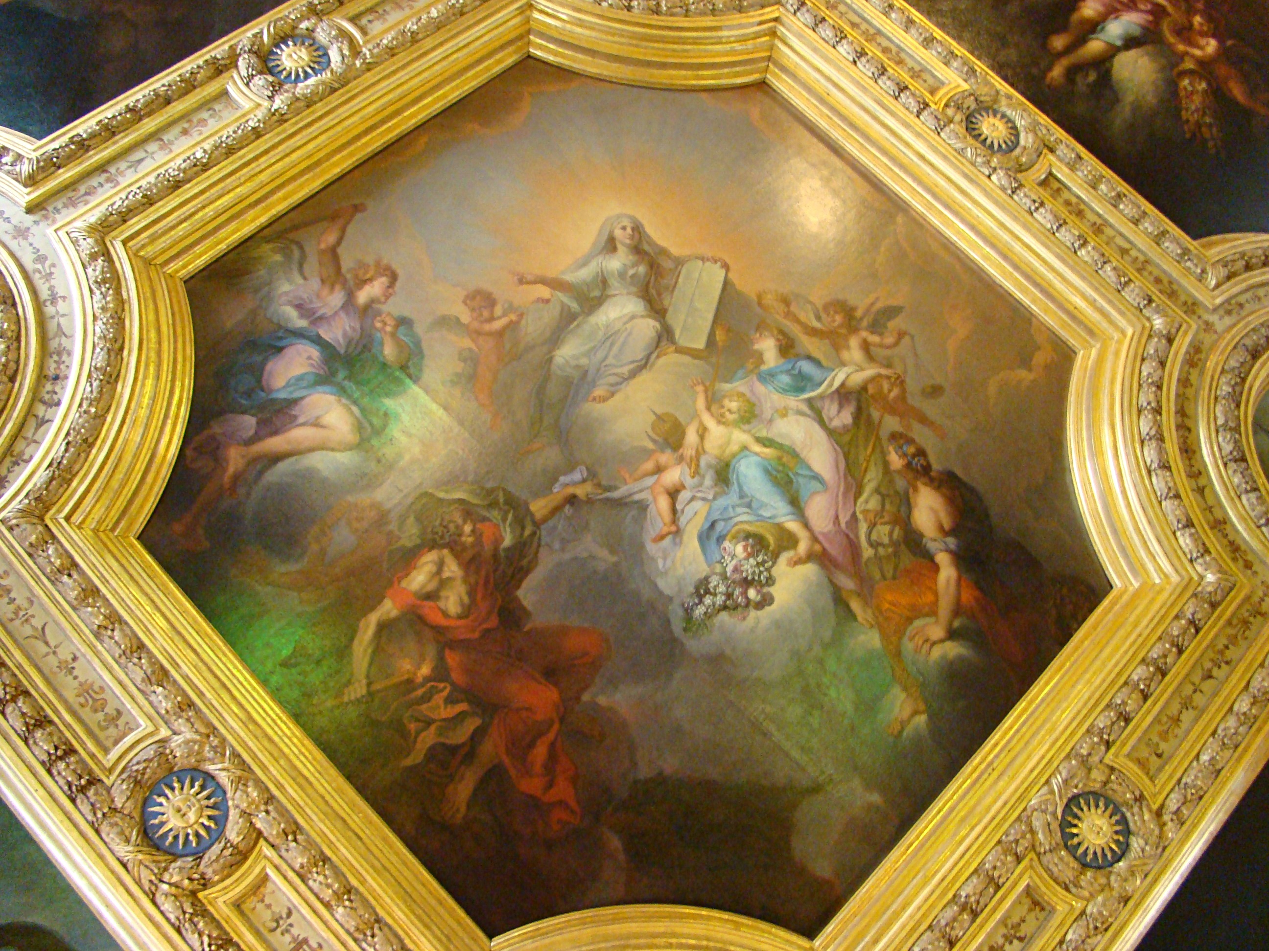 Détail du plafond de la Cour d'appel du parlement de Bretagne : le triomphe de la justice.